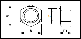 DIN 929